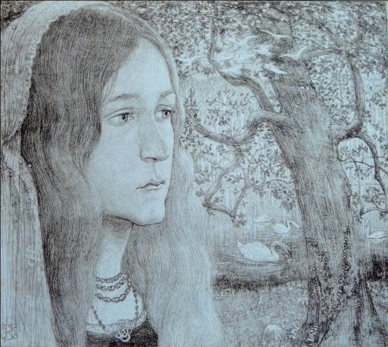 Helga's Entry